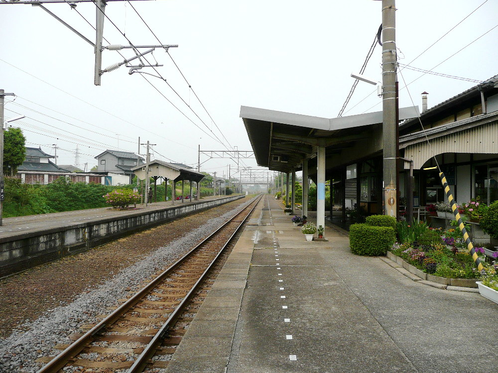 日豊本線今津駅・ホーム 投稿者↑PON（ウエポン）が2007年5月5日に撮影 一部編集の上で2007年5月12日にアップロード